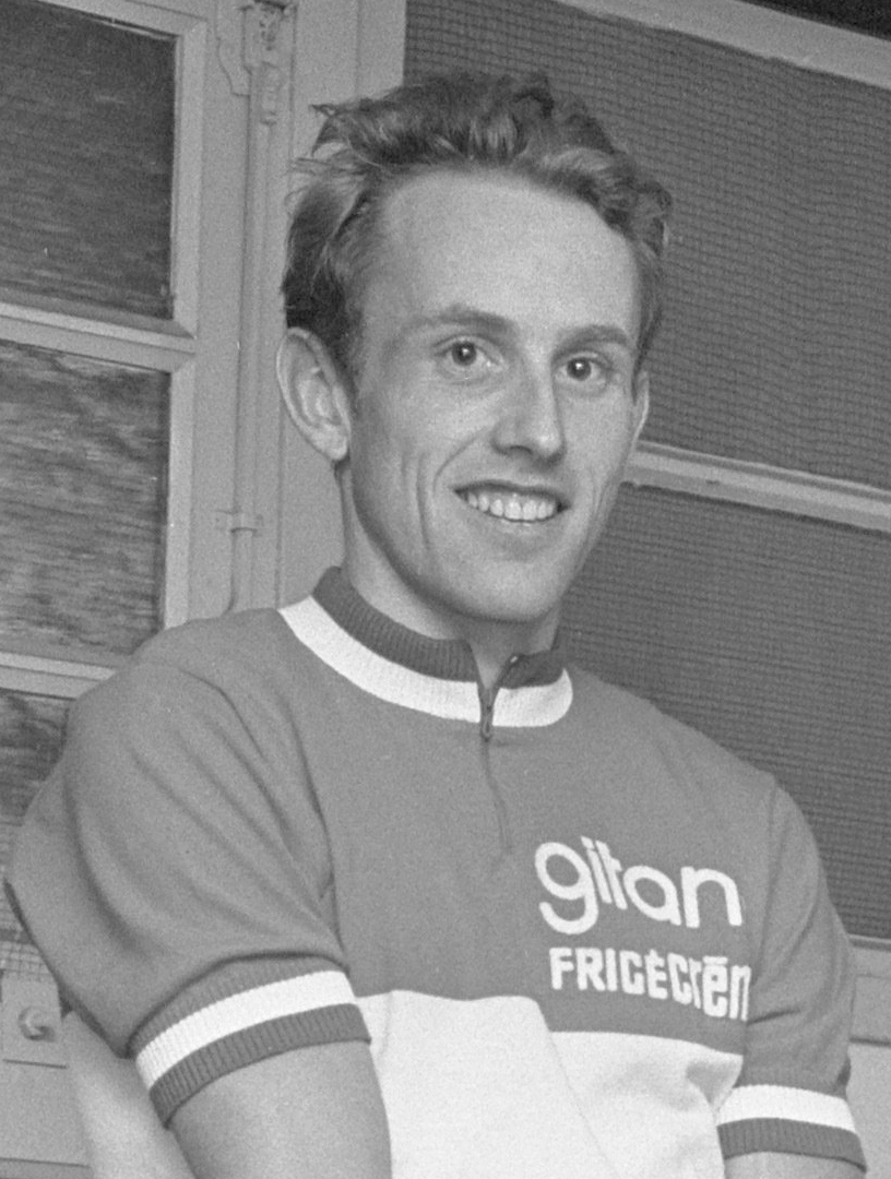 Nationaal Archief Beschrijving: Joop Zoetemelk Datum: 2 augustus 1973 Bestanddeelnummer 926-5866 Vervaardiger: Anefo / Verhoeff, Bert URL: Voor meer informatie over het Nationaal Archief: Voor meer foto's uit deze en andere collecties, bezoek onze Beeldbank:, U kunt ons helpen onze kennis van de fotocollecties te verrijken door tags en commentaren toe te voegen. Herkent u mensen of locaties of heeft u een bijzonder verhaal te vertellen bij één van de foto's, laat dan een reactie achter (als u ingelogd bent bij Flickr) of stuur een mailtje naar